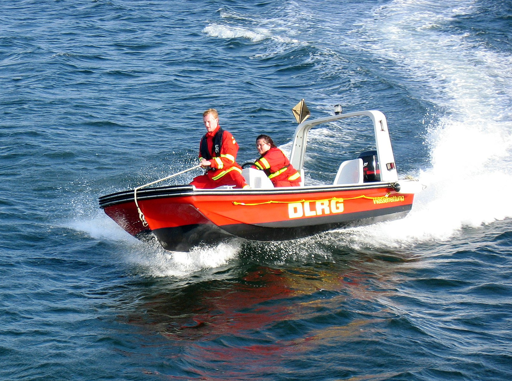 Ein Motorrettungsboot der DLRG in voller Fahrt